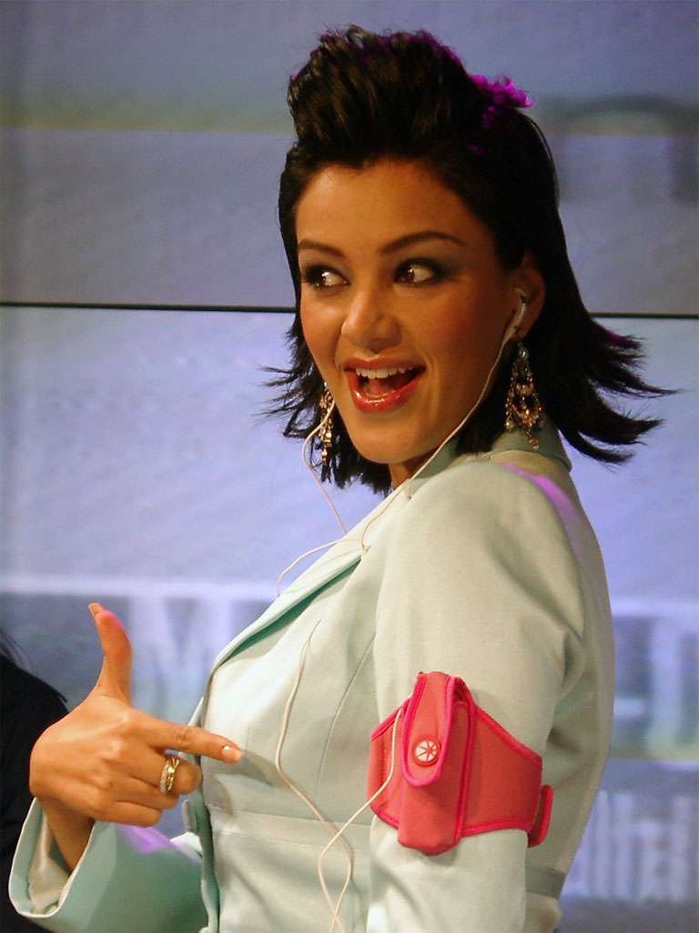 Verona Pooth, November 2004. Verona Pooth en noviembre de 2004